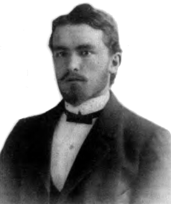 Фотография известного уральского геолога Модеста Онисимовича Клера